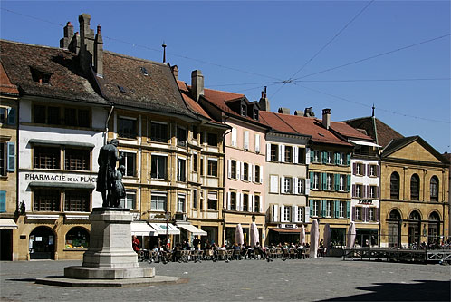 Yverdon: Place Pestalozzi